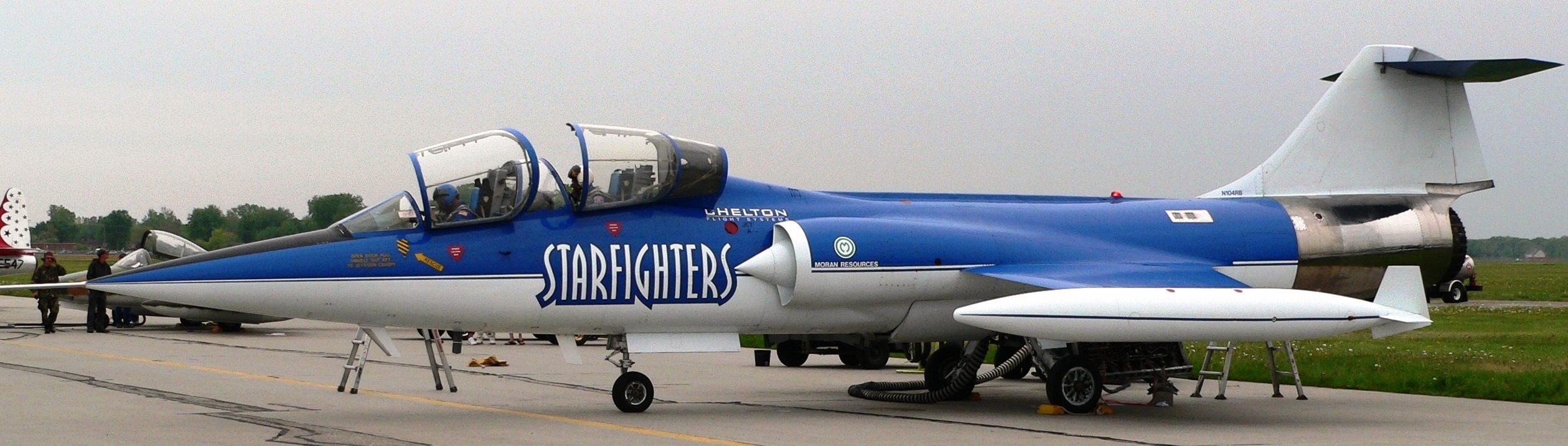 En Demonstrations-Starfighter.